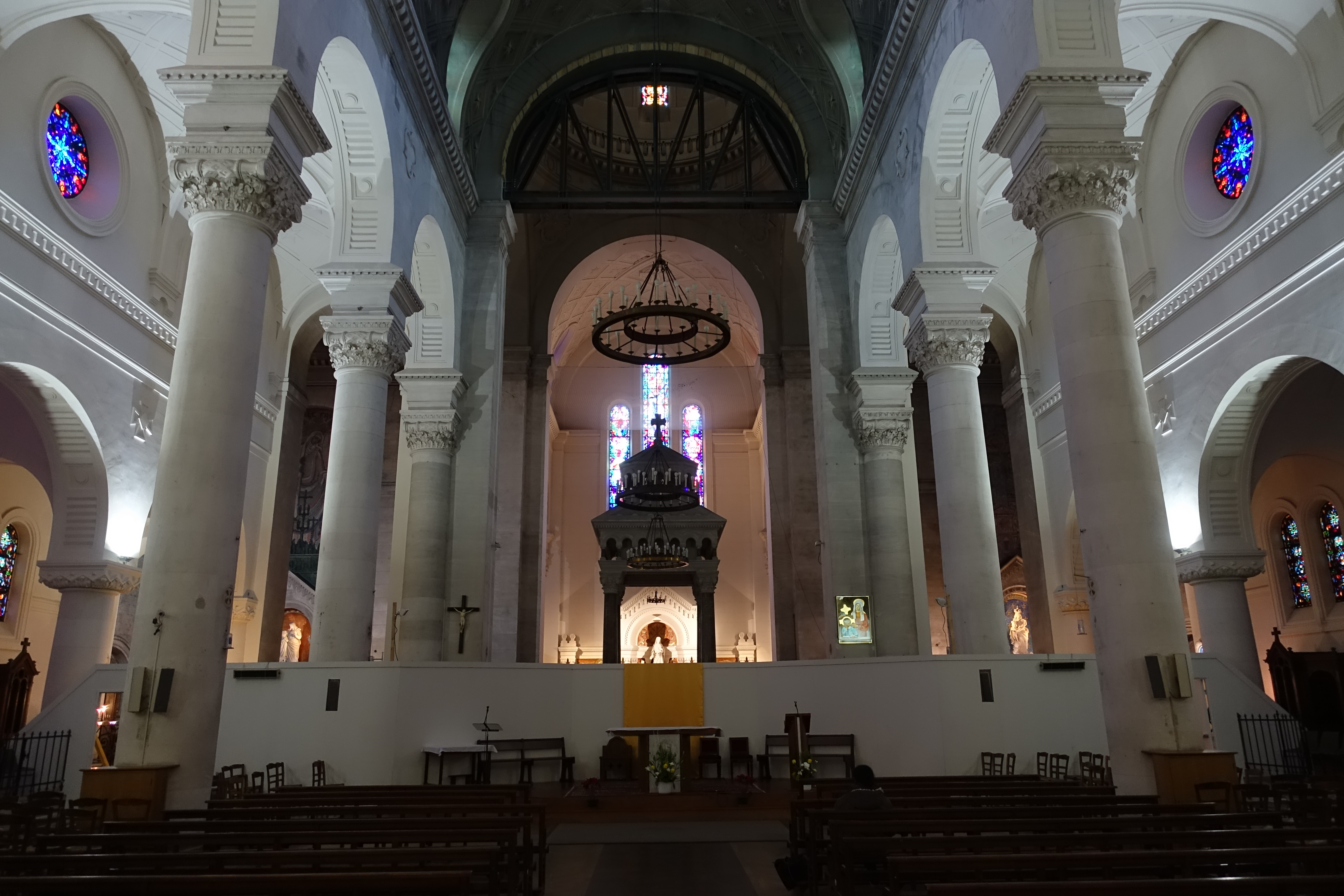 Eglise Sainte-Anne de la Butte-aux-Cailles @ Paris Église Sainte-Anne-de-la-Butte-aux-Cailles, 188 Rue de Tolbiac, 75013 Paris, France.